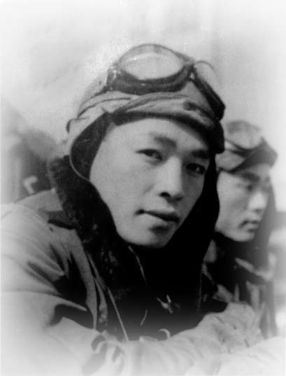 菅野直